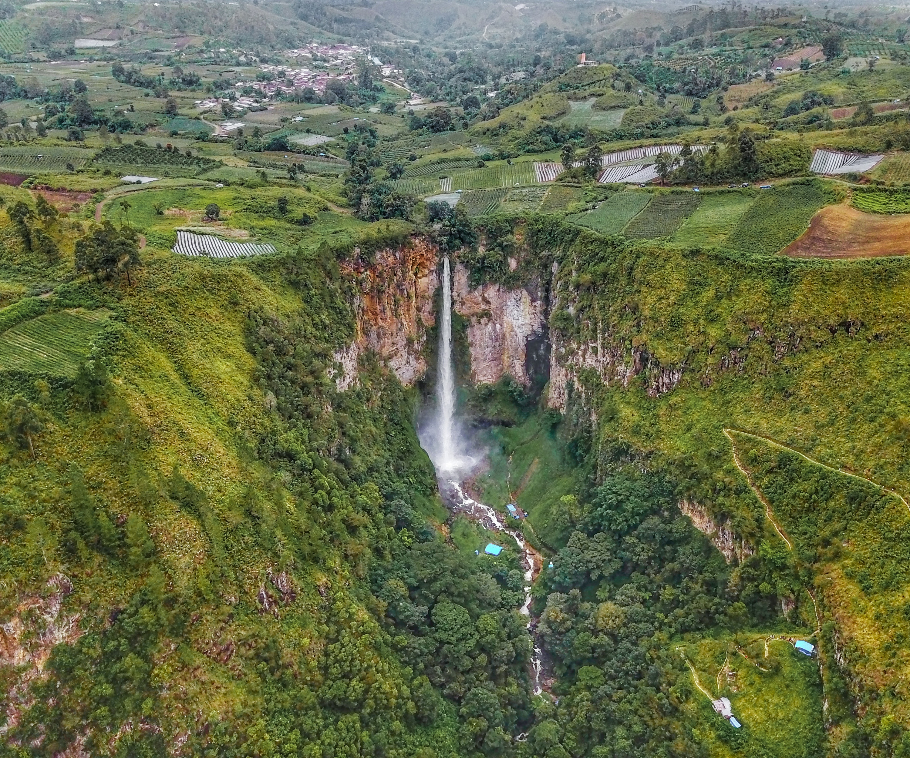 Air terjun Sipiso-Piso terletak di Desa Tongging, Kecamatan Merek, Kabupaten Karo, Propinsi Sumatera Utara.